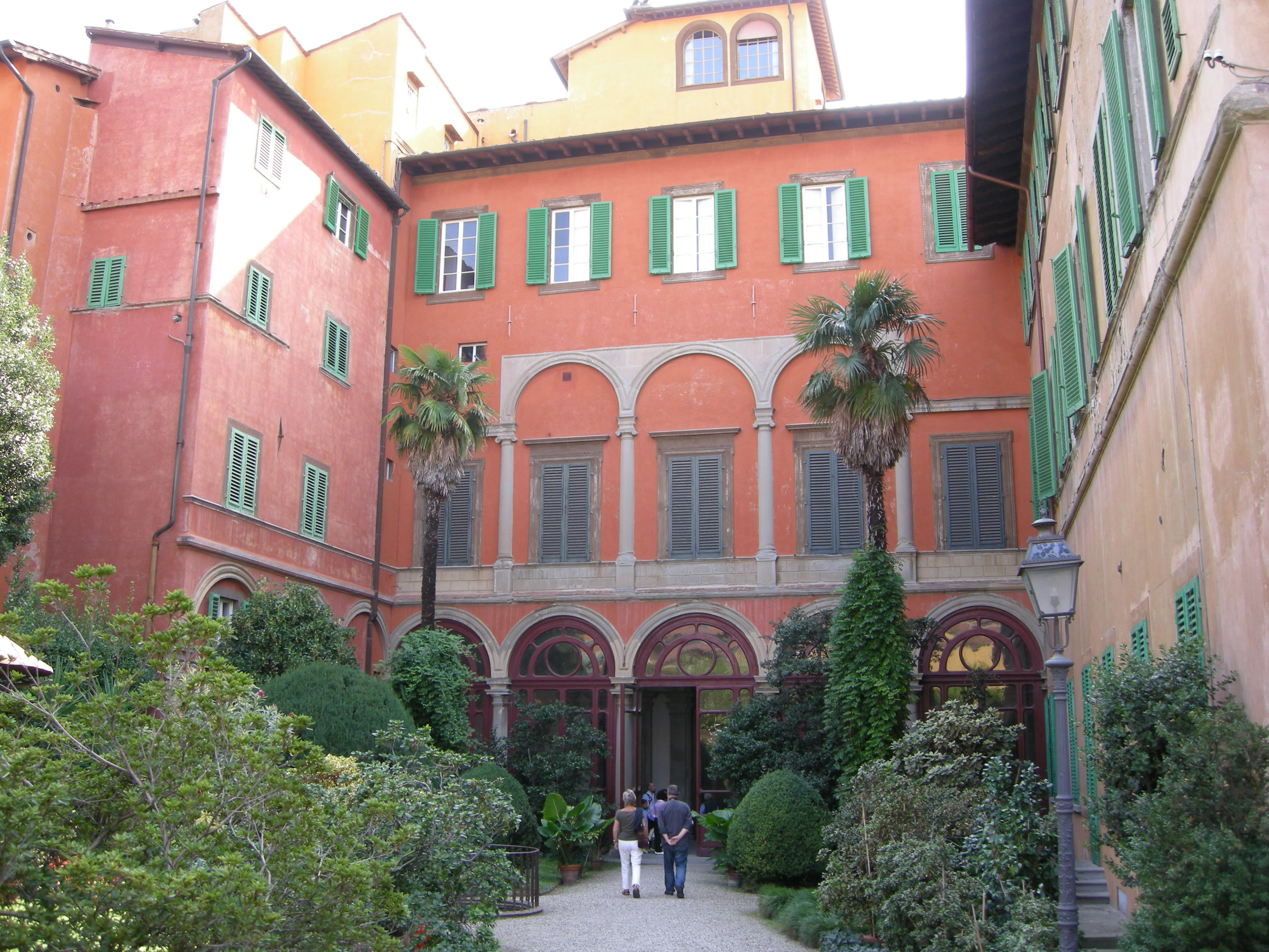 Palazzo Budini Gattai, retro 2